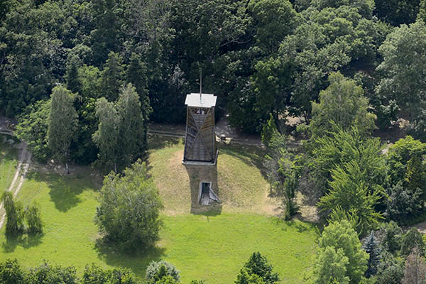 Légifotó a tiszakürti arborétumról